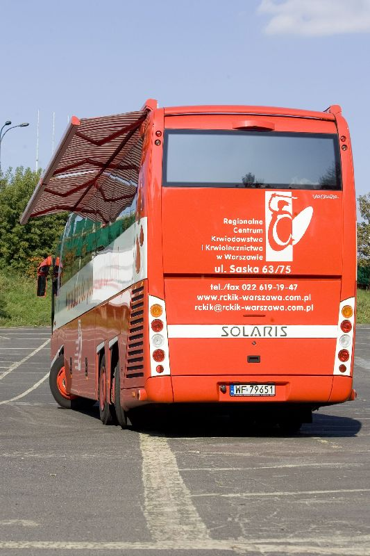 Ambulans